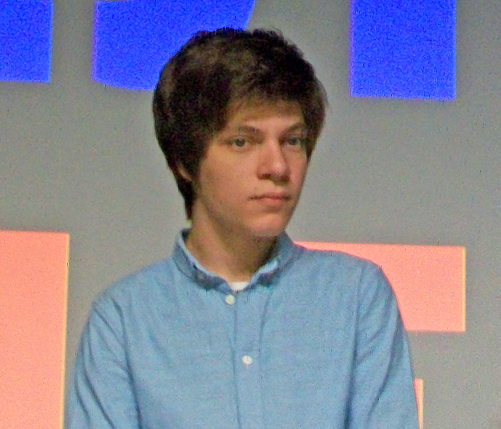 Егор Клинаев на презентации фильма Частное пионерское-3